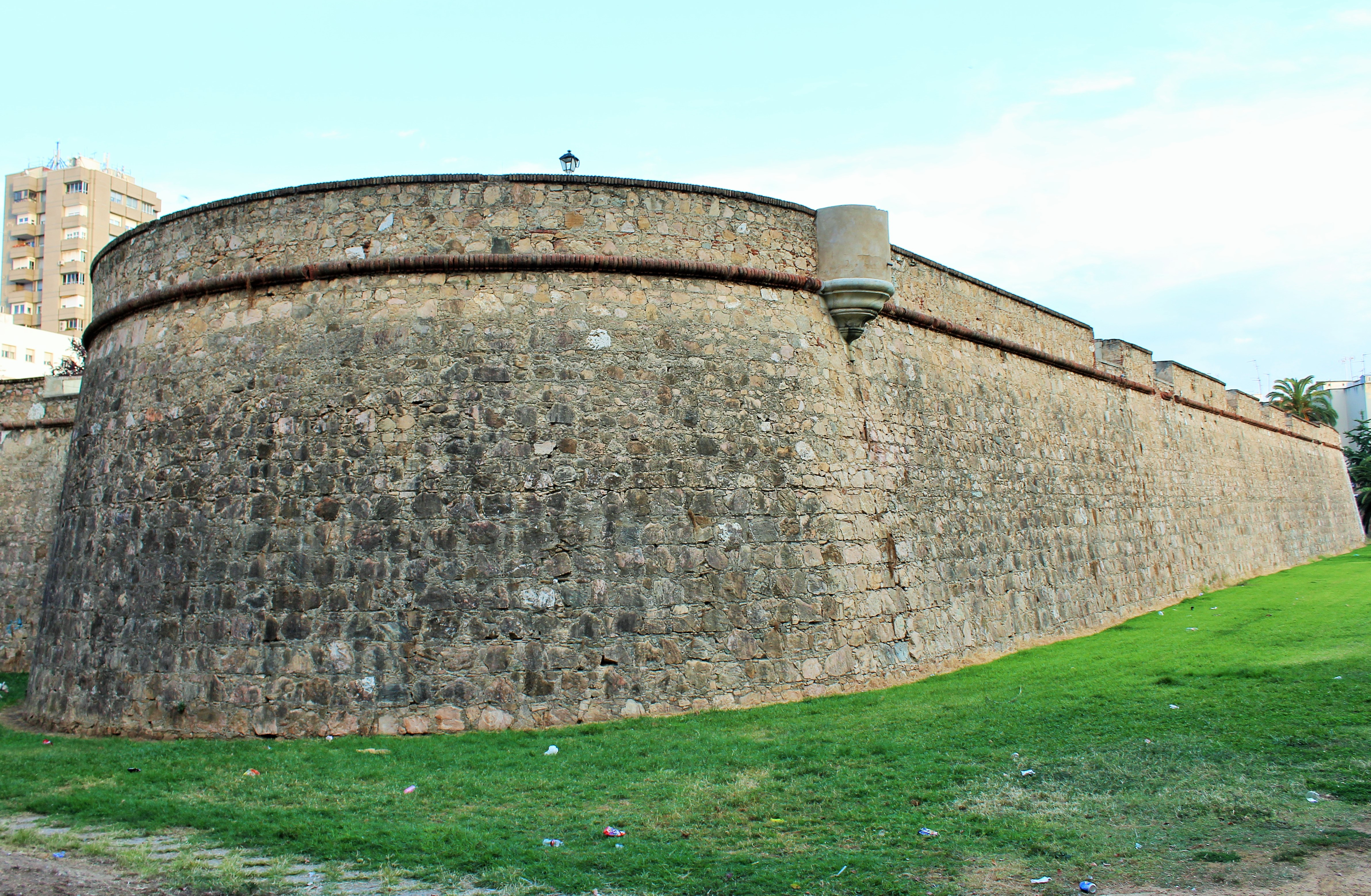 Recinto abaluartado de Badajoz. Baluarte de Santiago. Orejón en la zona oeste, murallas, troneras y garita